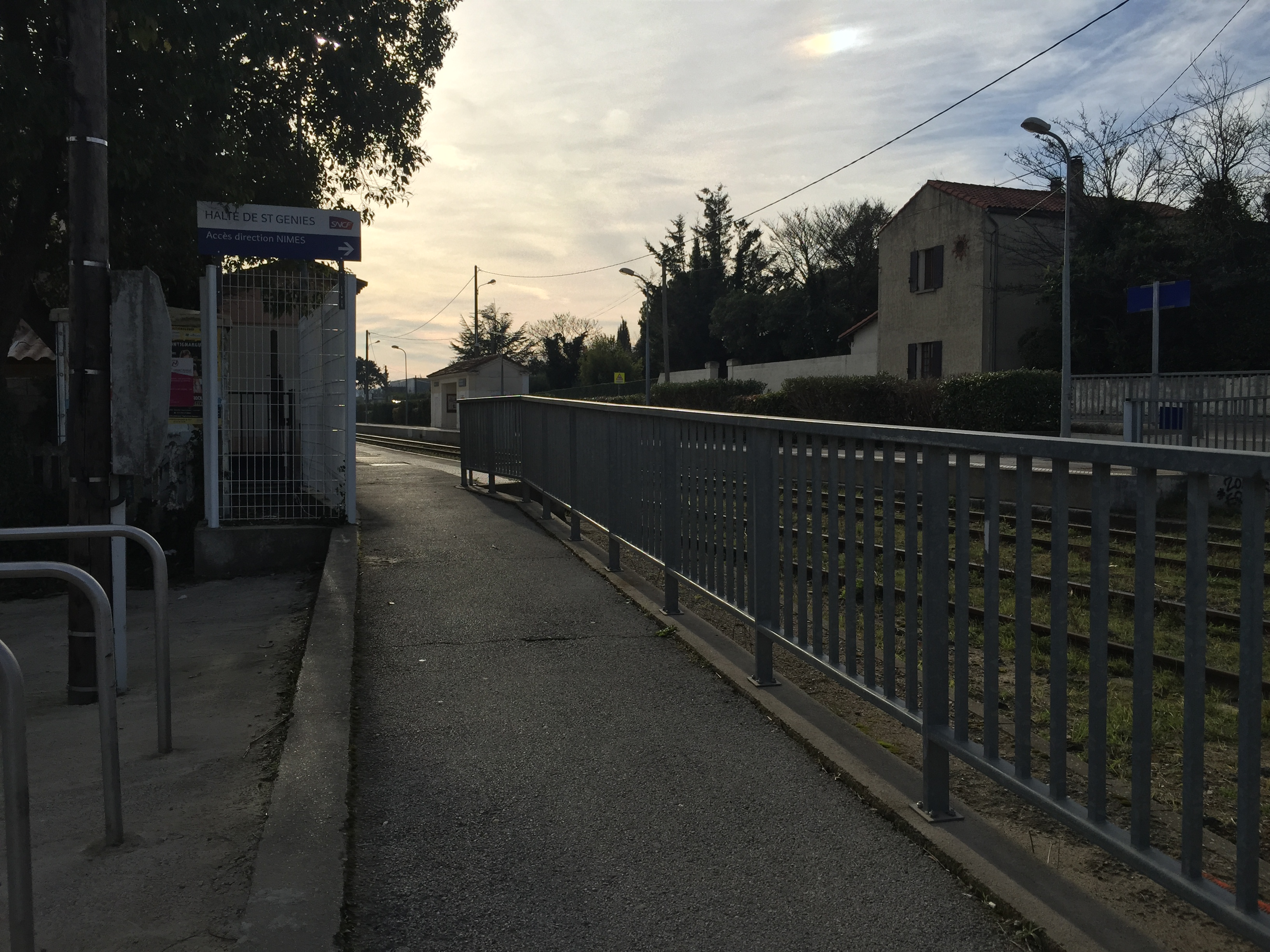 Aperçu de la gare (Halte) de Saint-Géniès-de-Malgoirès